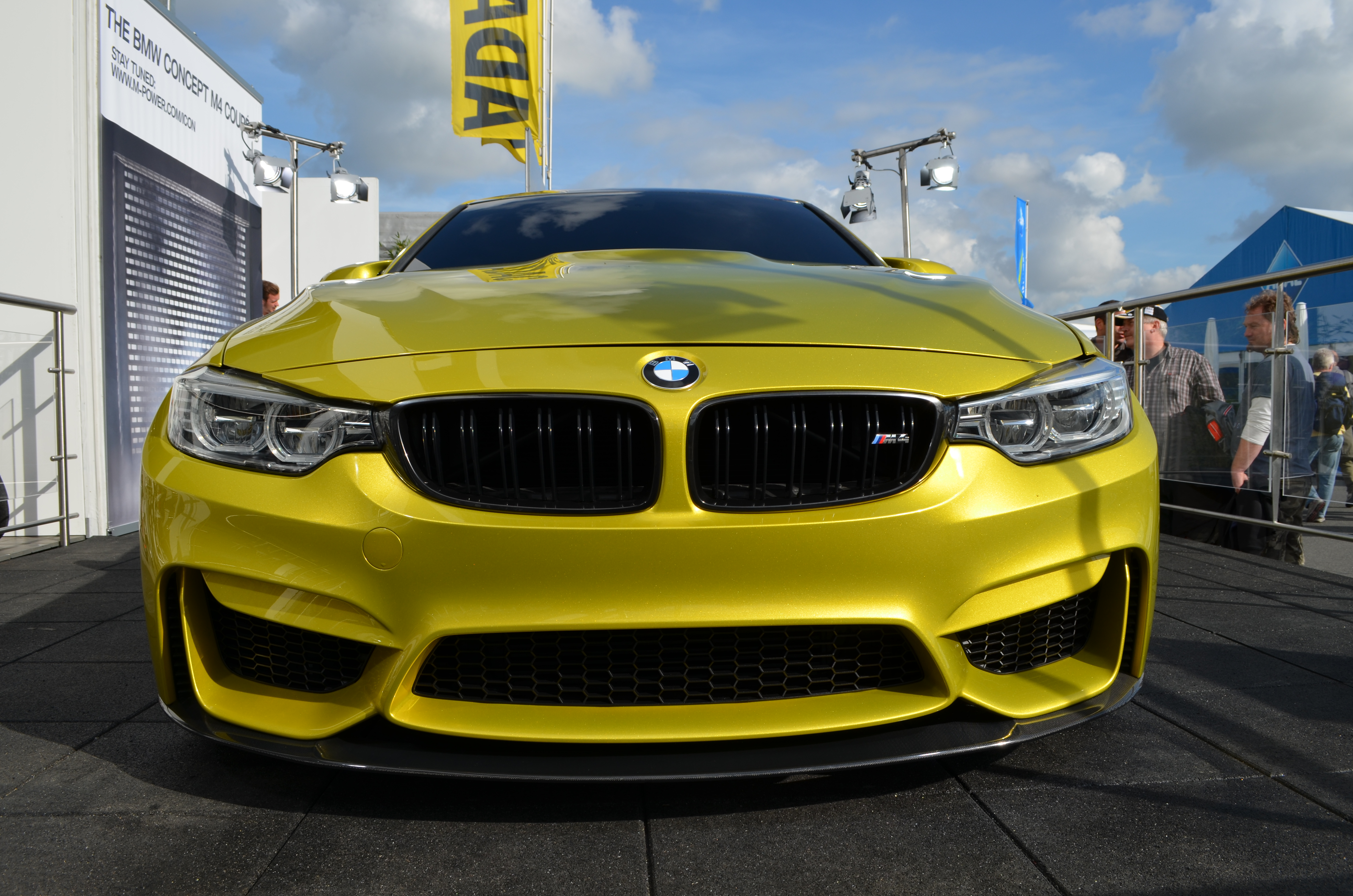 DTM Hockenheim 2013